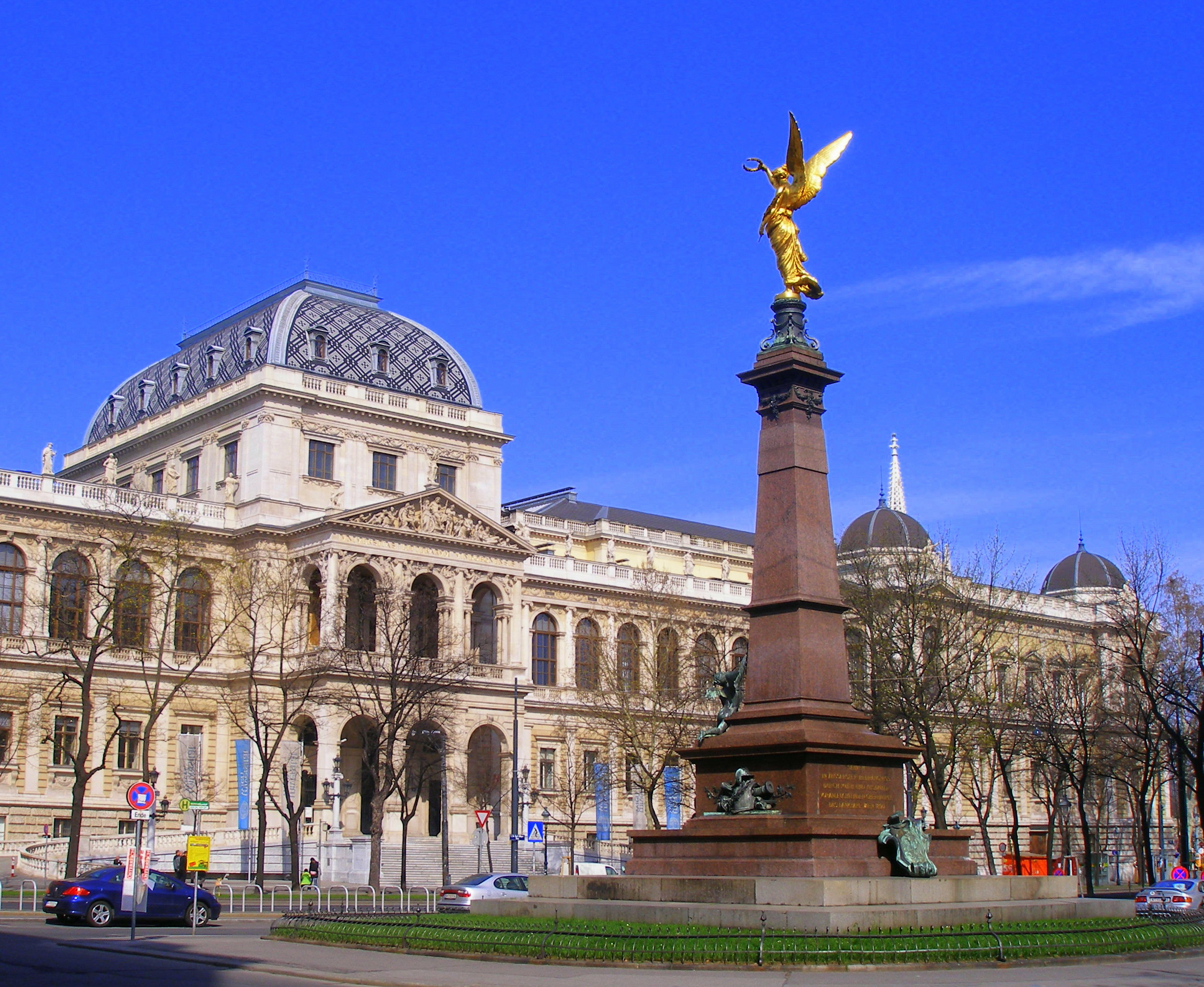 Historická budova univerzity vo Viedni.